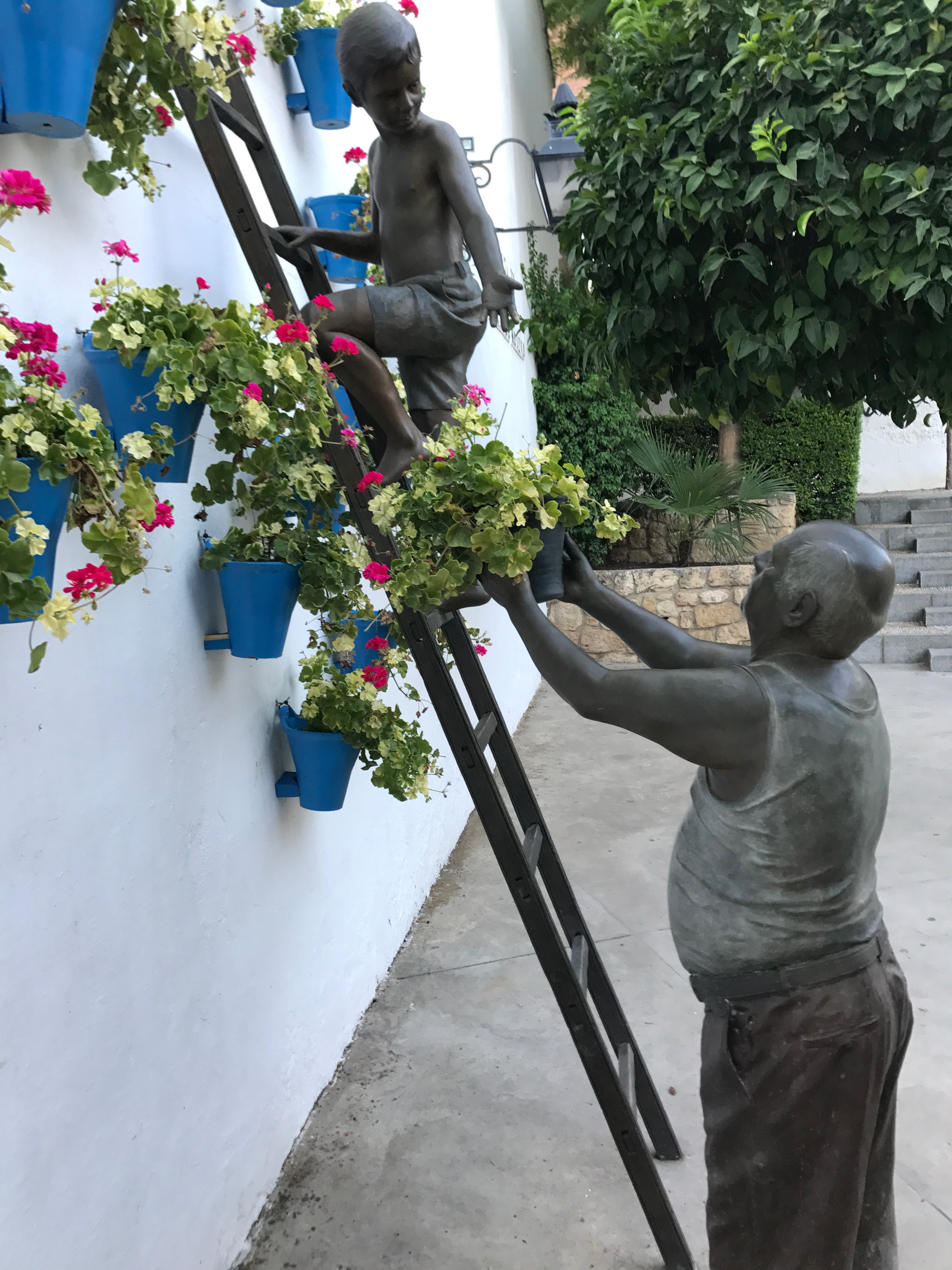 Sstatua dedicada a los patios, Cordoba 2017.